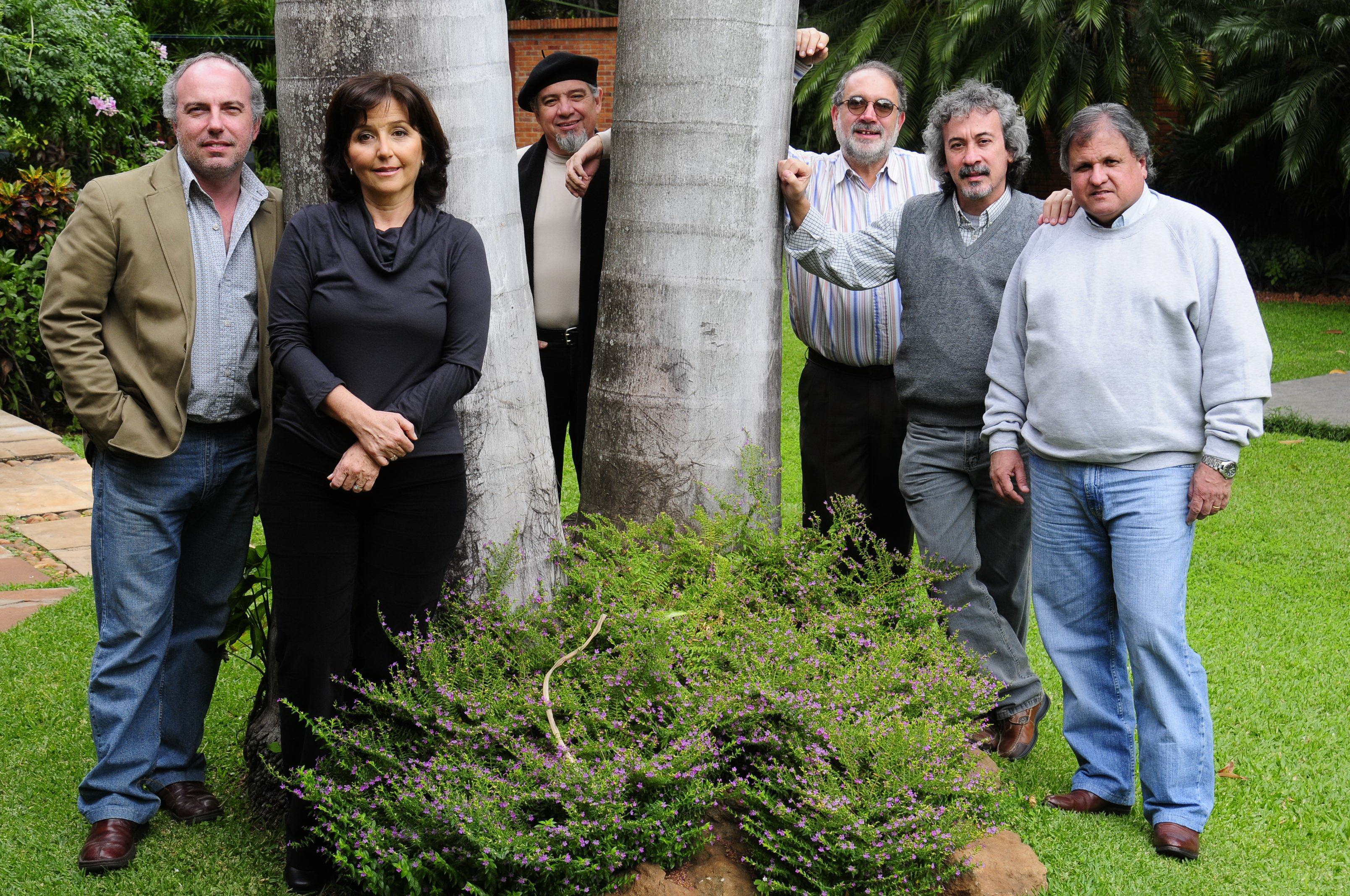 Conformación anterior del grupo Sembrador